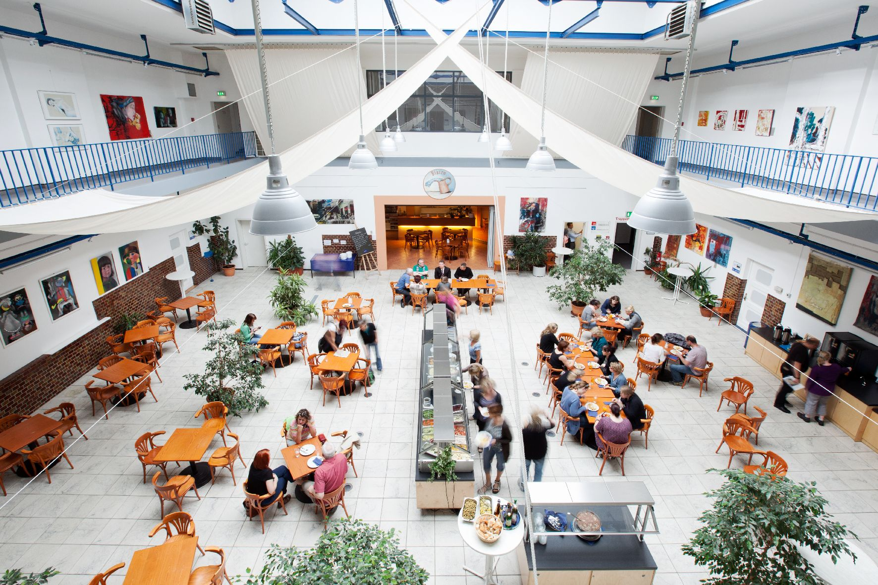 Die ehem. Lohnhalle 2011